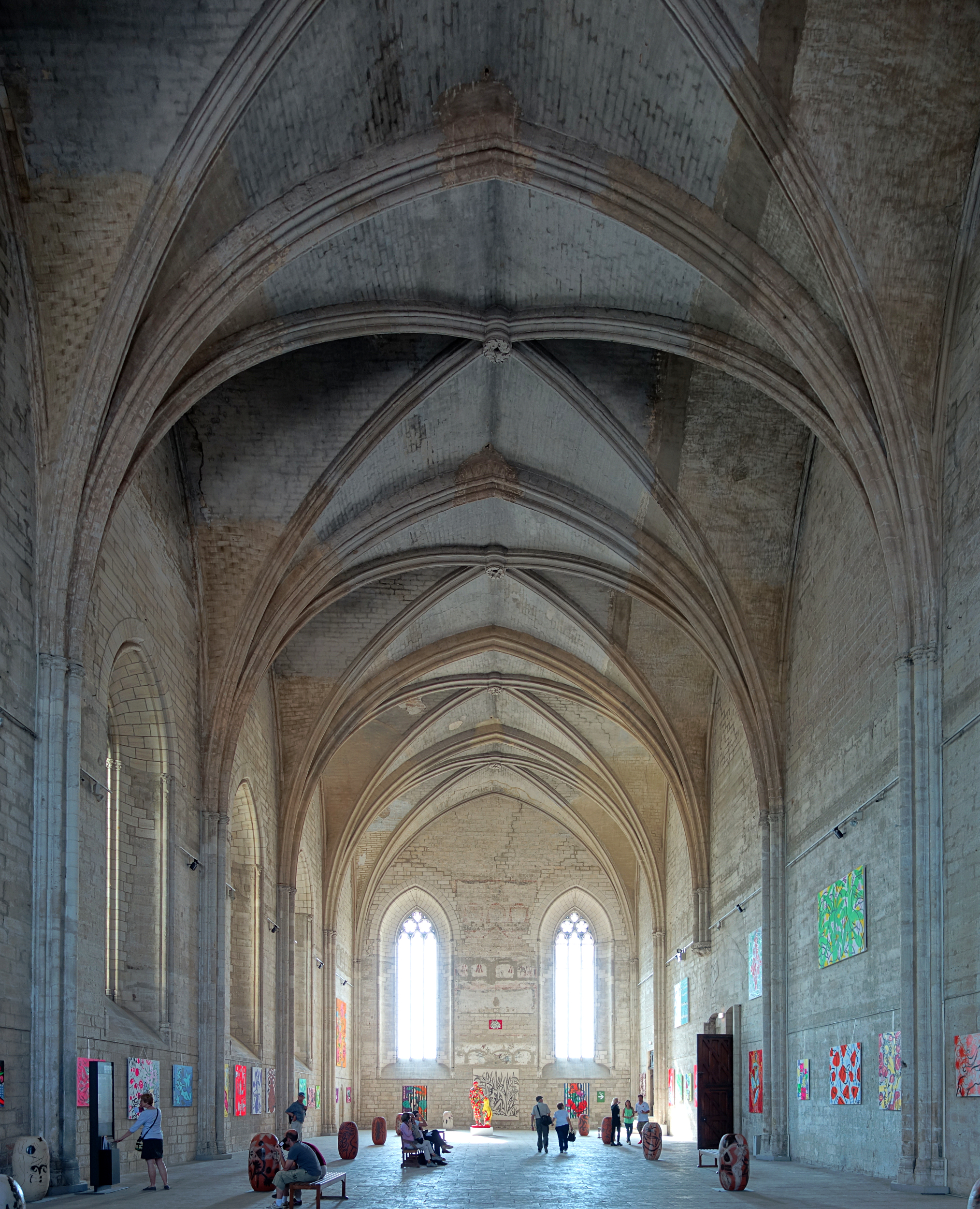 La grande chapelle dans le Palais des Papes d'Avignon, longue de 52 m sous une voûte qui culmine à 19,5 m.